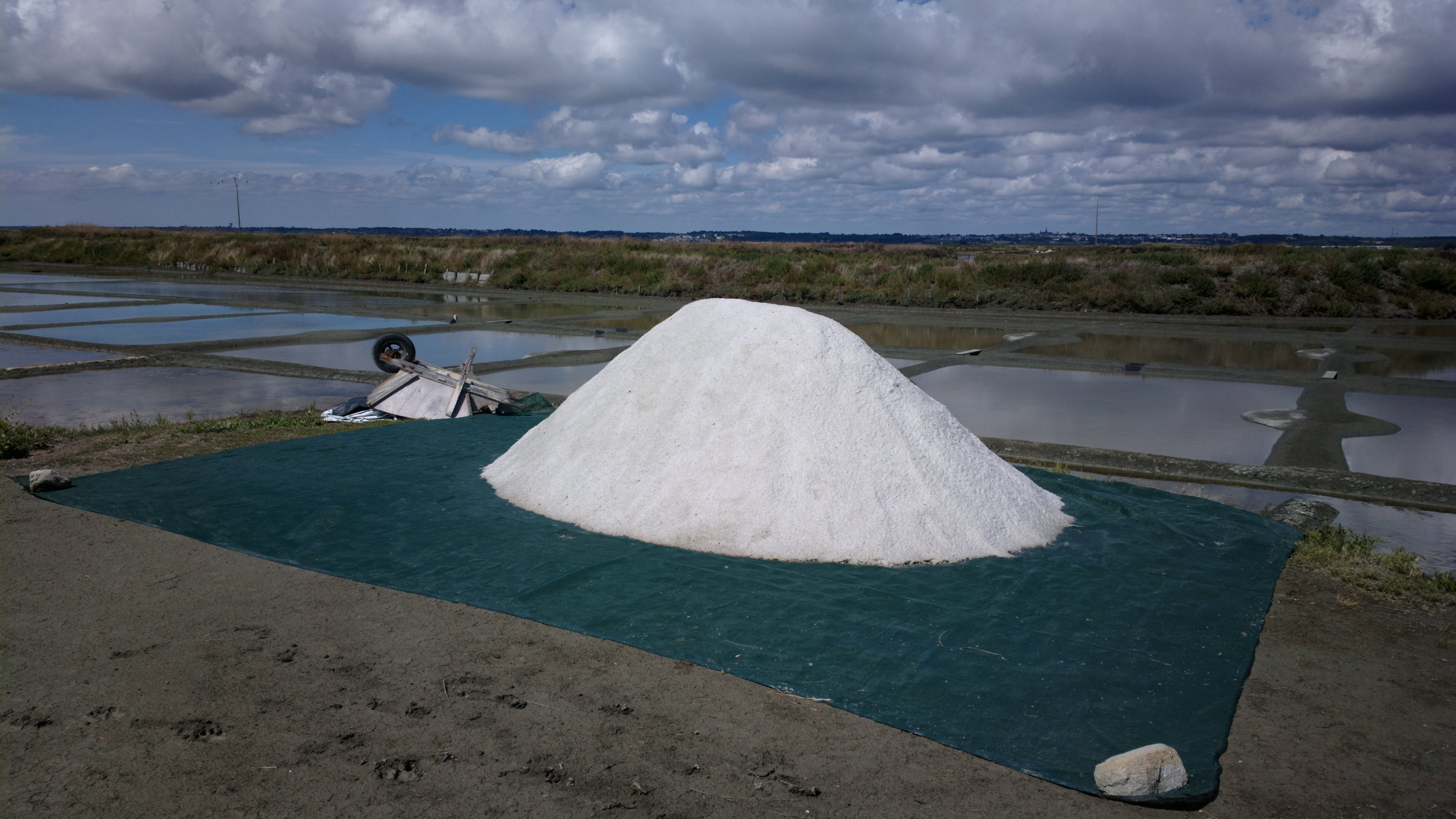 Kervalet est un village paludier français du sud de la Bretagne, situé en Loire-Atlantique, sur la commune de Batz-sur-Mer.